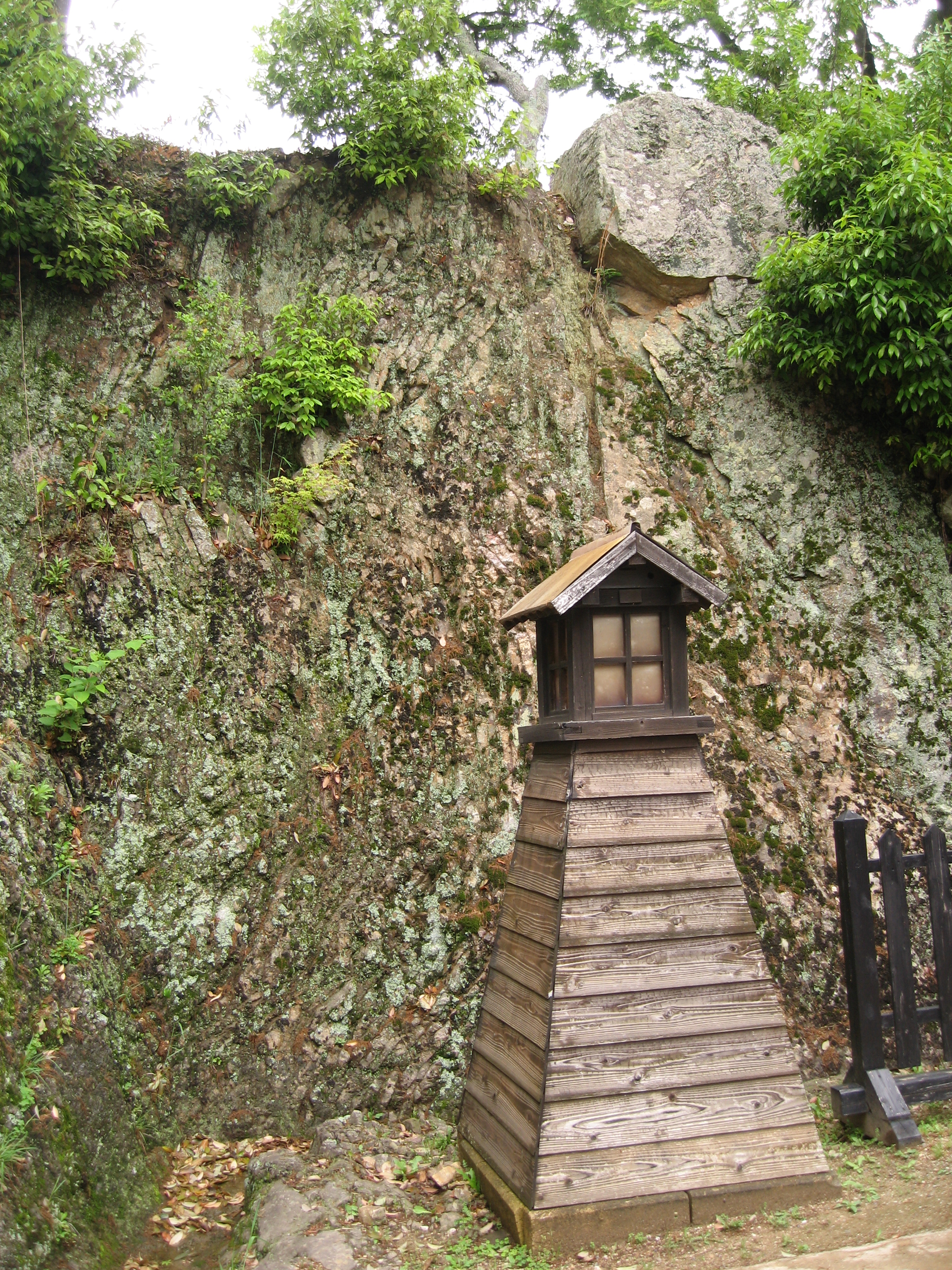 彦根城の辻行灯